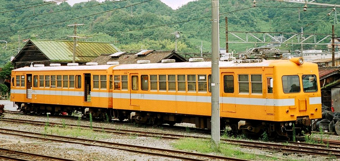 近江鉄道モハ1形電車のモハ4。近江鉄道彦根駅構内にて、撮影。